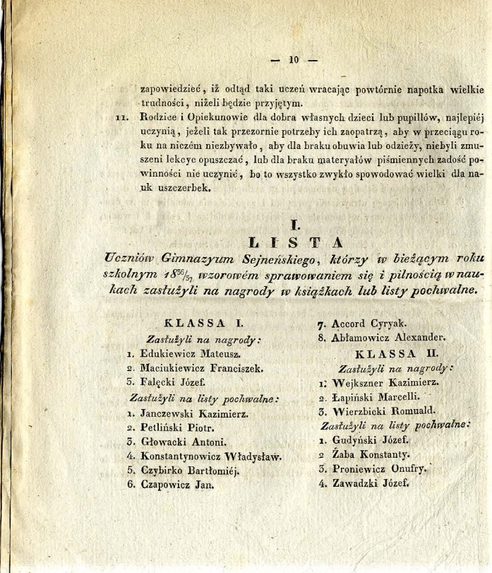 Skan z publikacji: Akt uroczysty zakończenia rocznego biegu nauk w Gimnazyum Sejneńskiem odbędzie się dnia 17/29 lipca 1837. roku. na który władze rządowe, tudzież rodziców i opiekunow uczącej się młodzieży Dyrektor tegoż Gimnazyum imieniem całego zgromadzenia nauczycielskiego zaprasza, Suwałki 1837